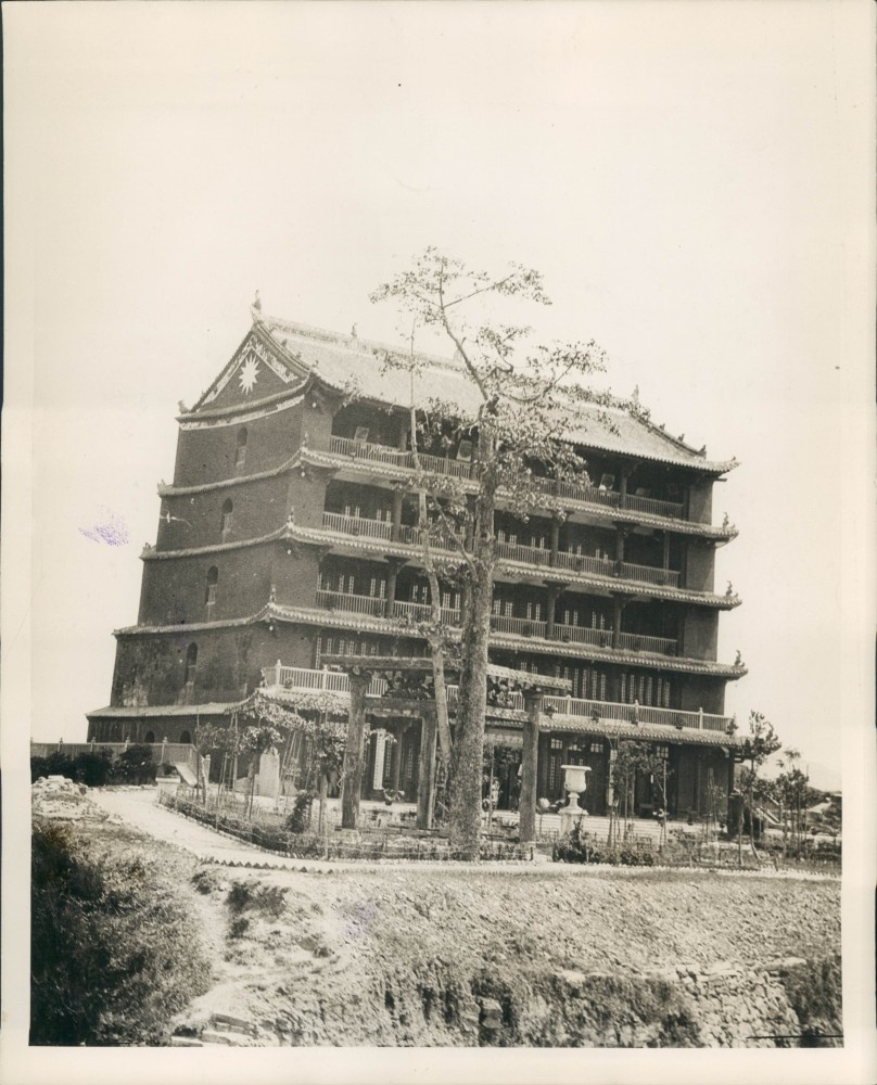 廣州市觀音山（越秀山）鎮海樓。